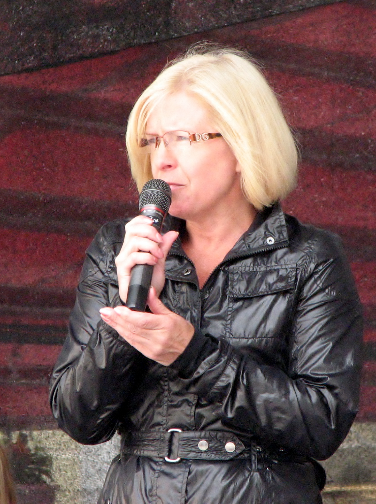 Aini Härm ürituse "Ava lava, Tallinn!" laval